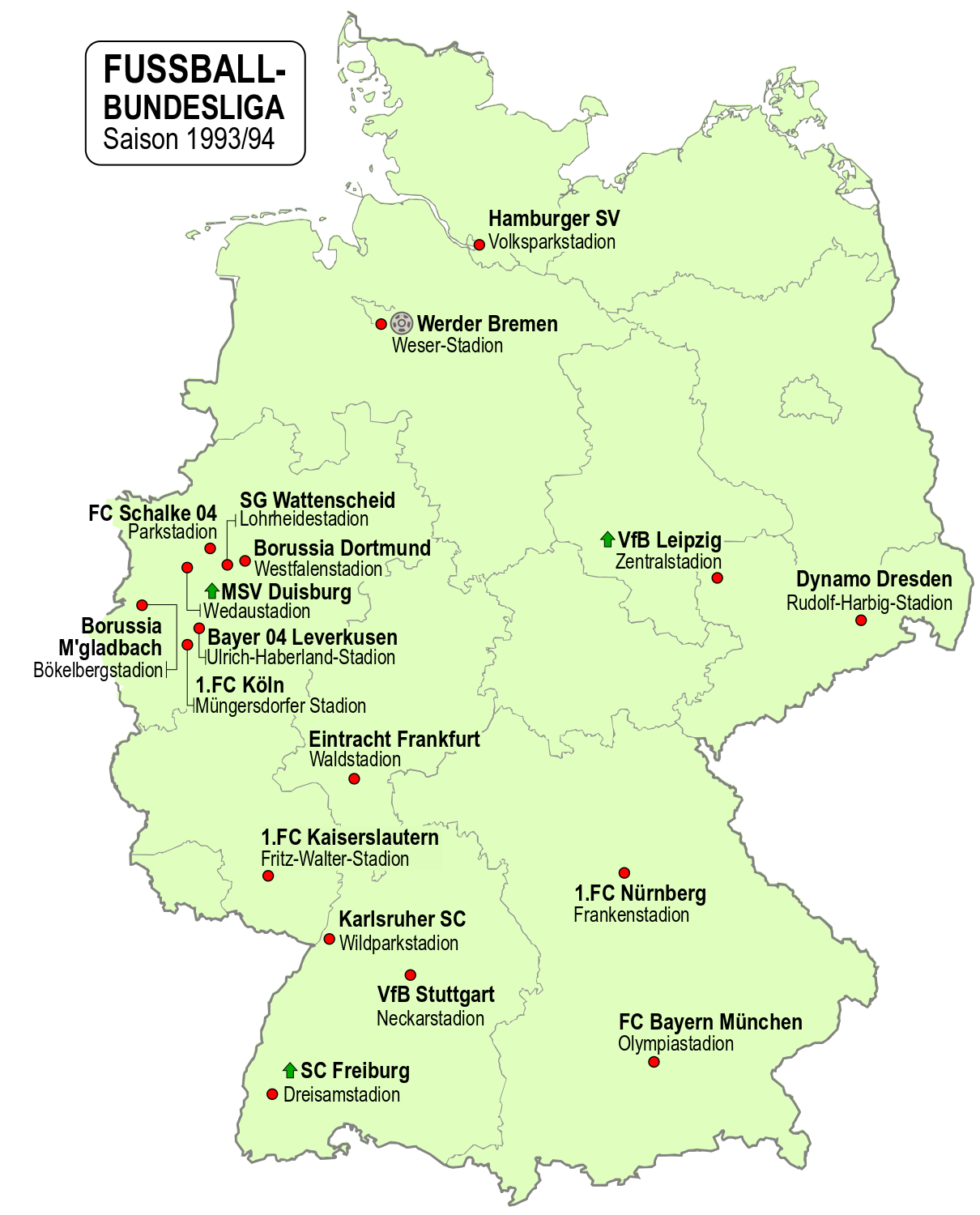 Karte der Vereine der Fussball-Bundesliga-Saison 1993/94